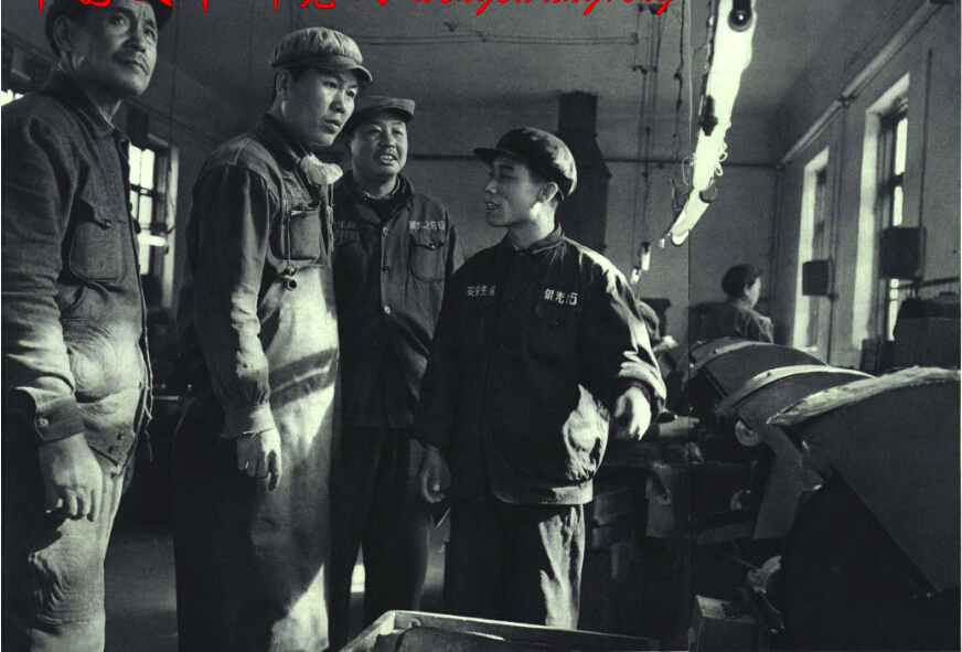 1966年黑龙江银光电镀厂